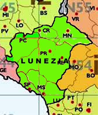 Mappa Lunezia